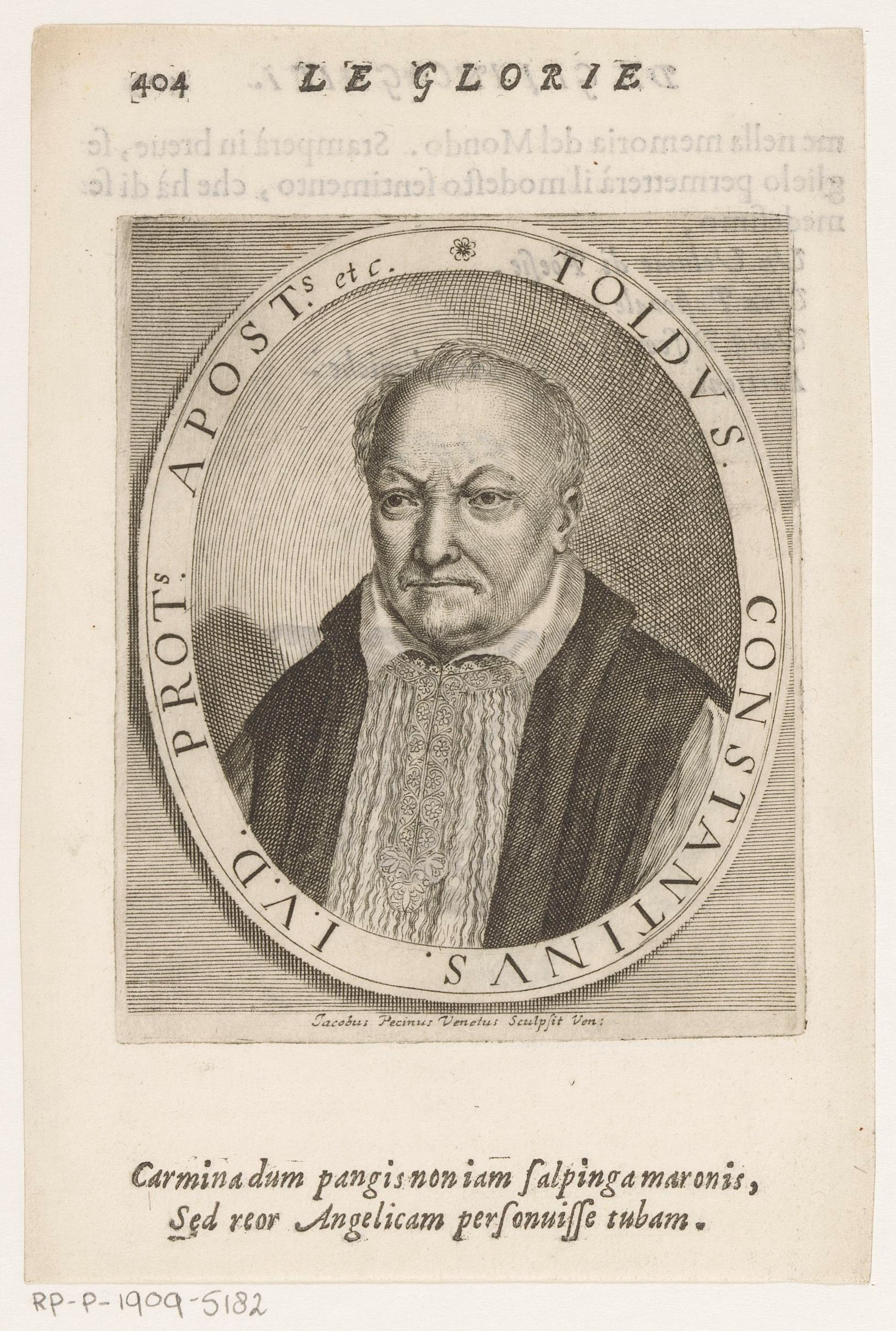 IdentificatieTitel(s): Portret van dichter en jurist Toldo ConstantiniObjecttype: prent boekillustratie Objectnummer: RP-P-1909-5182Opschriften / Merken: verzamelaarsmerk, verso, gestempeld: Lugt 2228VervaardigingVervaardiger: prentmaker: Giacomo Piccini (vermeld op object)uitgever: Francesco ValvasensePlaats vervaardiging: VenetiëDatering: 1647Fysieke kenmerken: gravure; tekst in boekdruk op recto en versoMateriaal: papier Techniek: graveren (drukprocedé) / boekdrukAfmetingen: plaatrand: h 120 mm × b 100 mmblad: h 182 mm × b 125 mmToelichtingPrent uit de publicatie: Loredan, Giovan Francesco. Le glorie degli Incogniti. Venetië: Francesco Valvasense, 1647, p. 404.OnderwerpWat: historical personswriter, poet, authorWie: Toldo ConstantiniVerwerving en rechtenVerwerving: aankoop 1905Copyright: Publiek domein